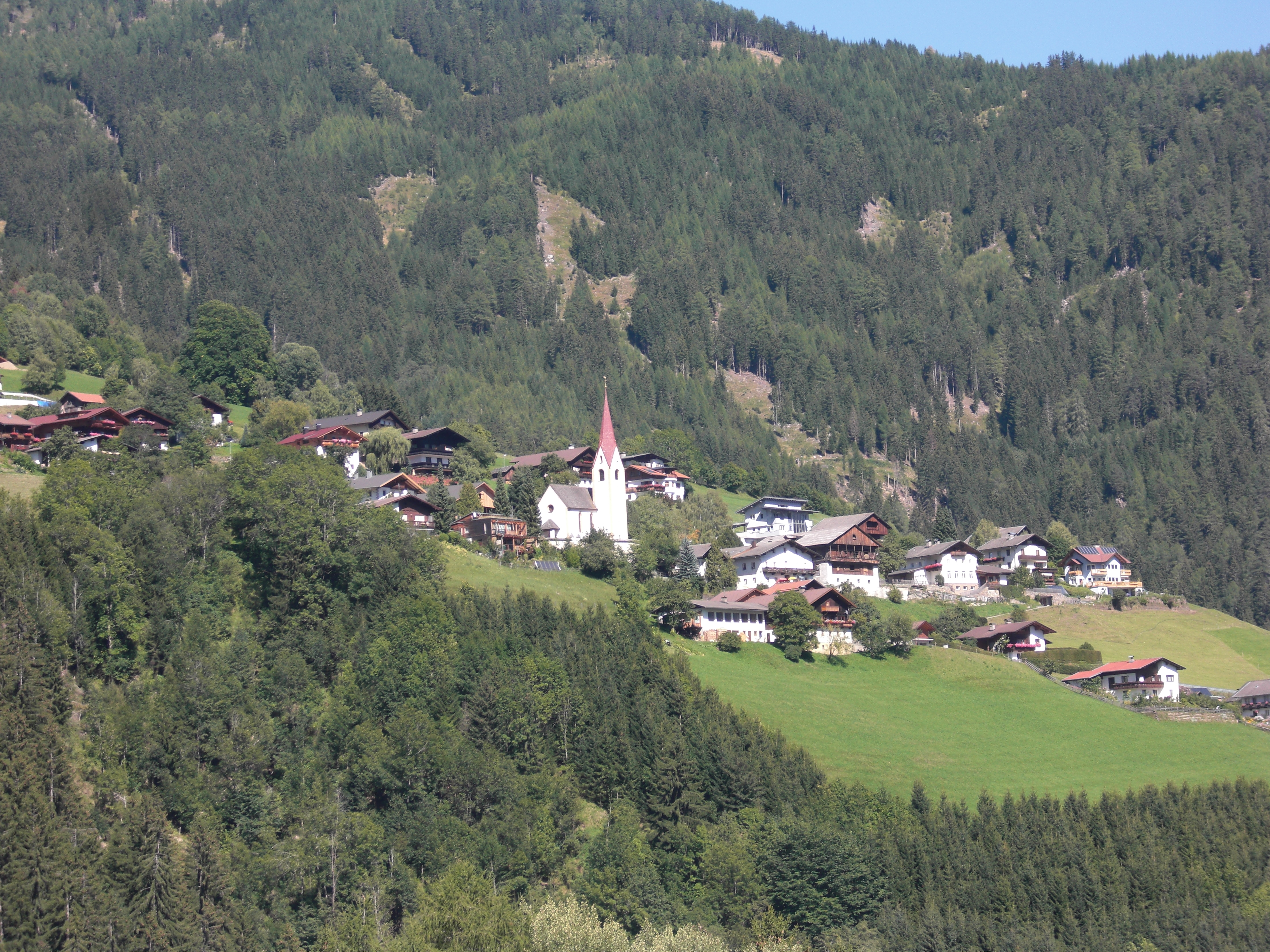 Blick auf den Ortsteil Bannber der Gemeinde Assling in Österreich.